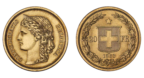 20 Fr 1883 en Or, image originale de SwissMint